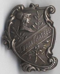 Insigne de la Corda Fratres